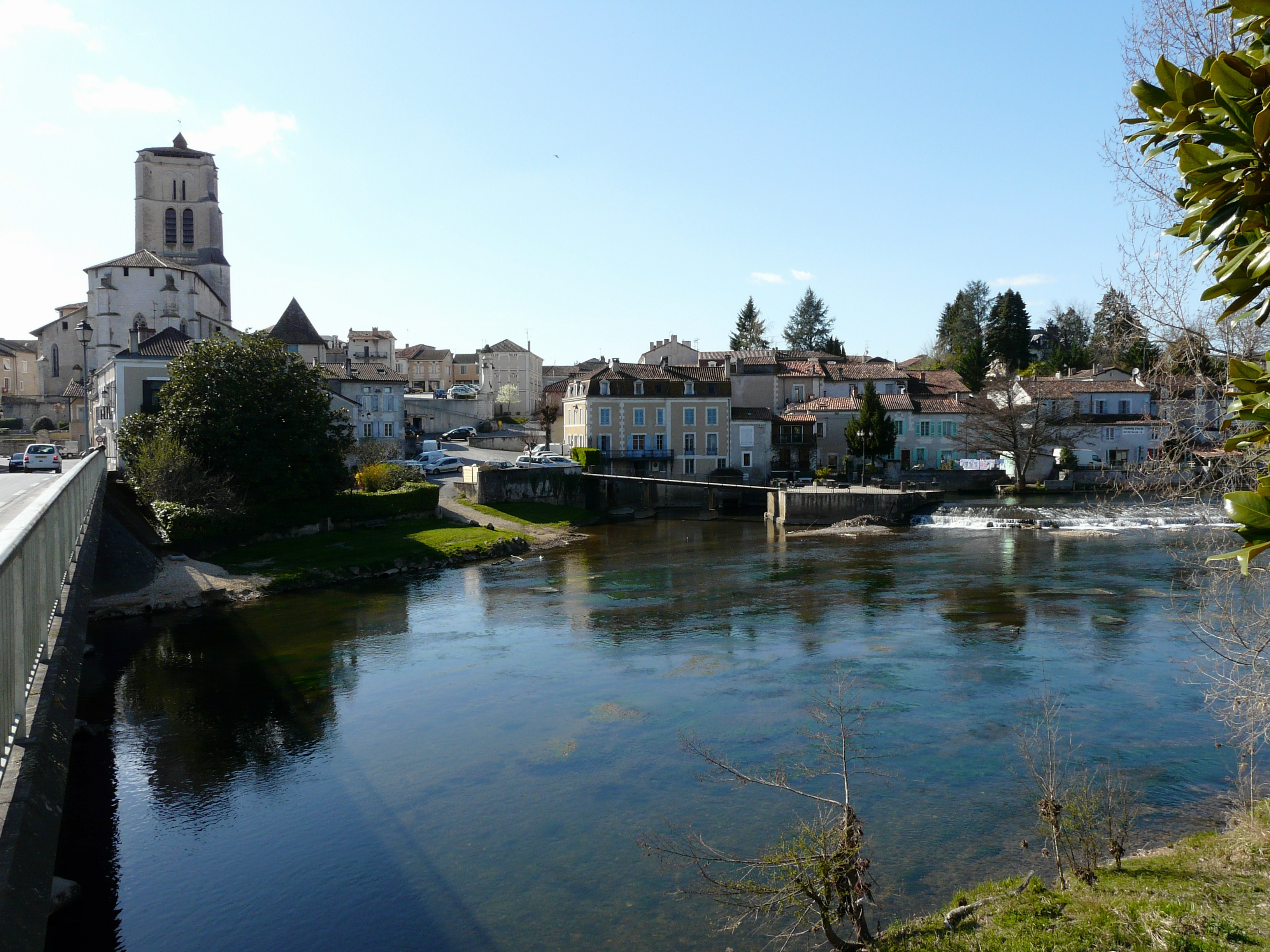 L'Isle à Saint-Astier, Dordogne, France